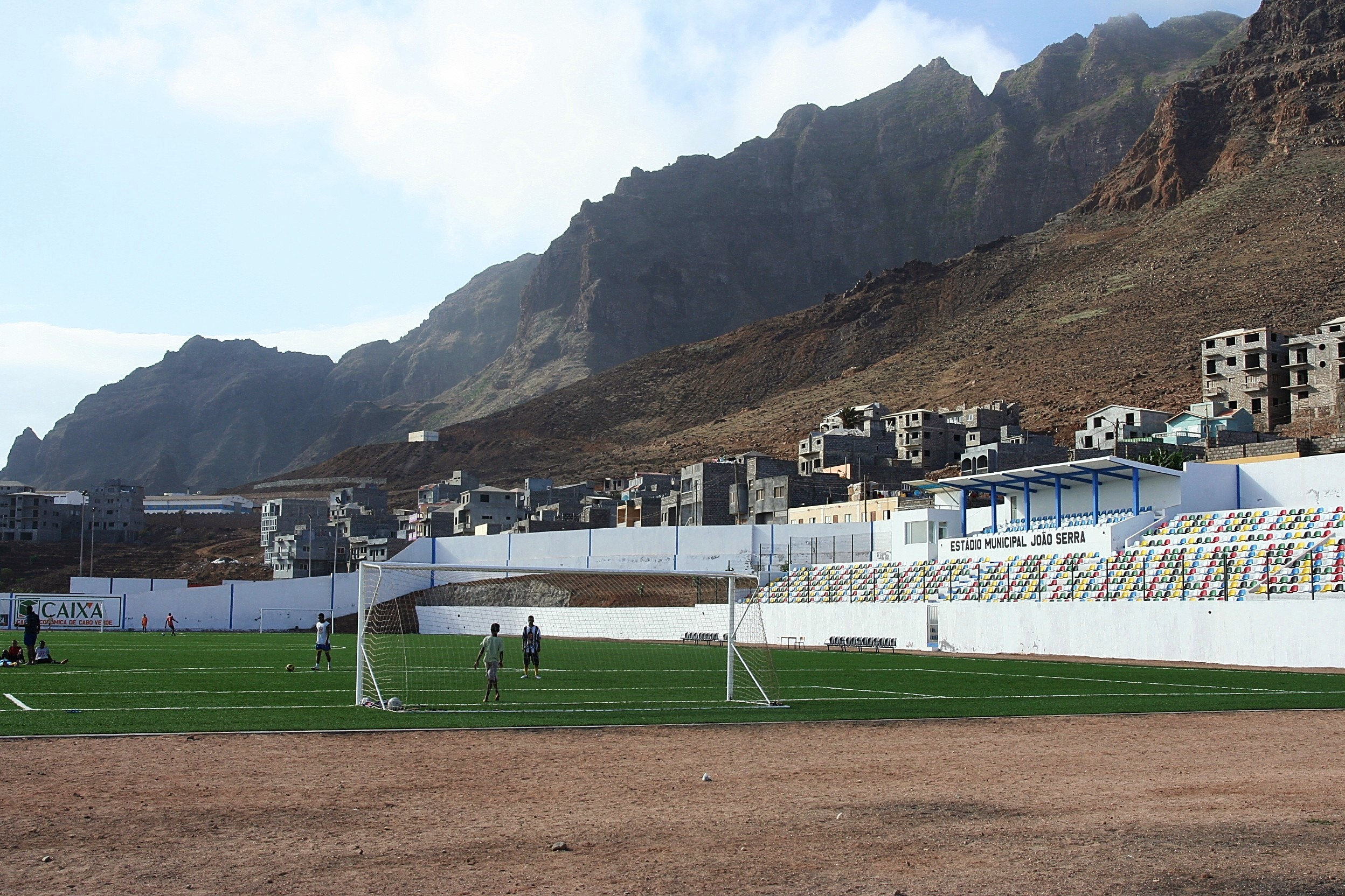 Stade municipal João Serra à Ponta do Sol (Santo Antão, Cap-Vert)